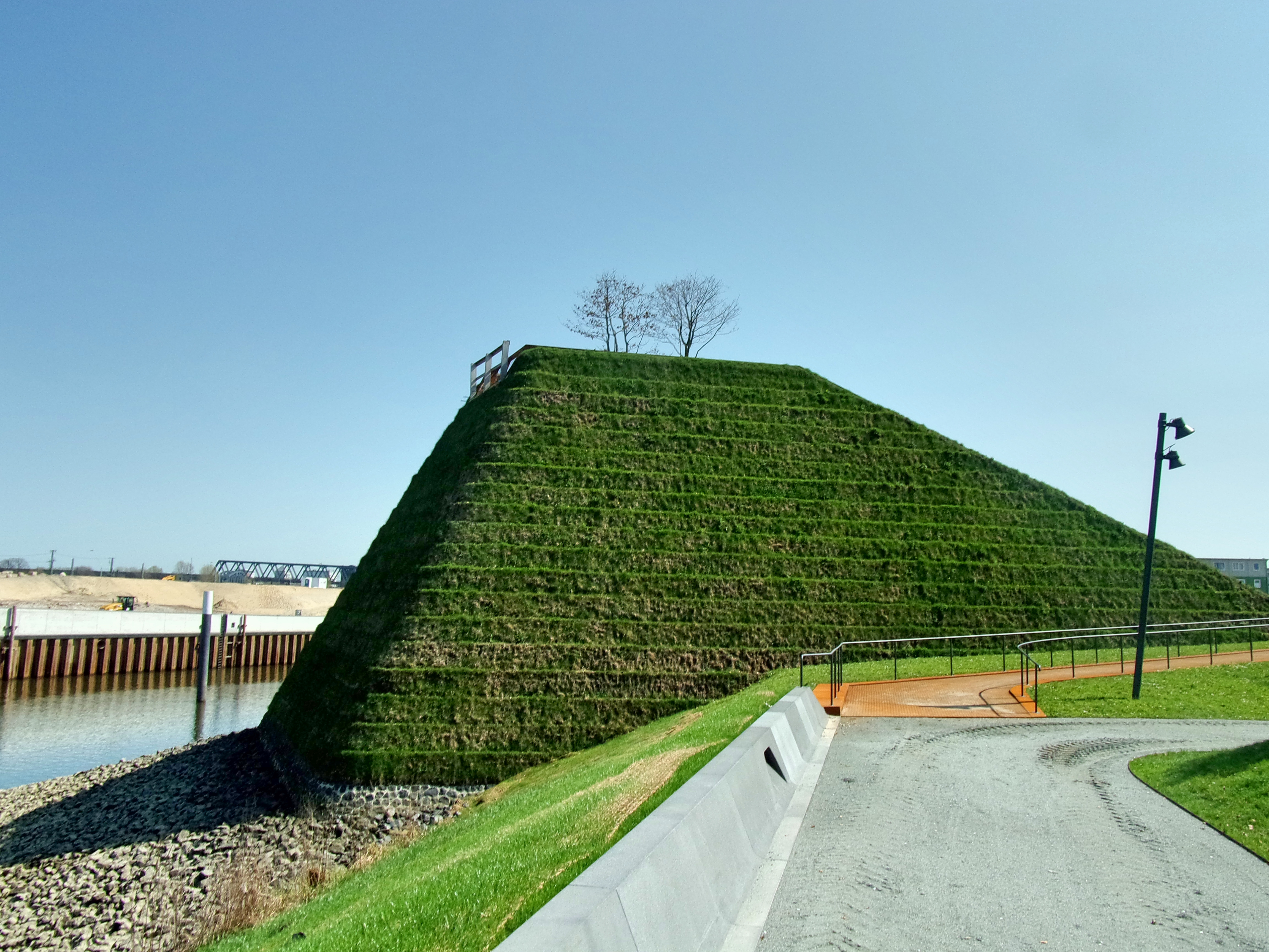 Der Himmelsberg im Baakenpark ist eine künstlich geschaffene Aussichtsplattform im neu angelegten Park am Baakenhafen, der Anfang Mai 2018 mit einem Fest offiziell eröffnet wird. Mehr zum Himmelsberg unter folgendem link